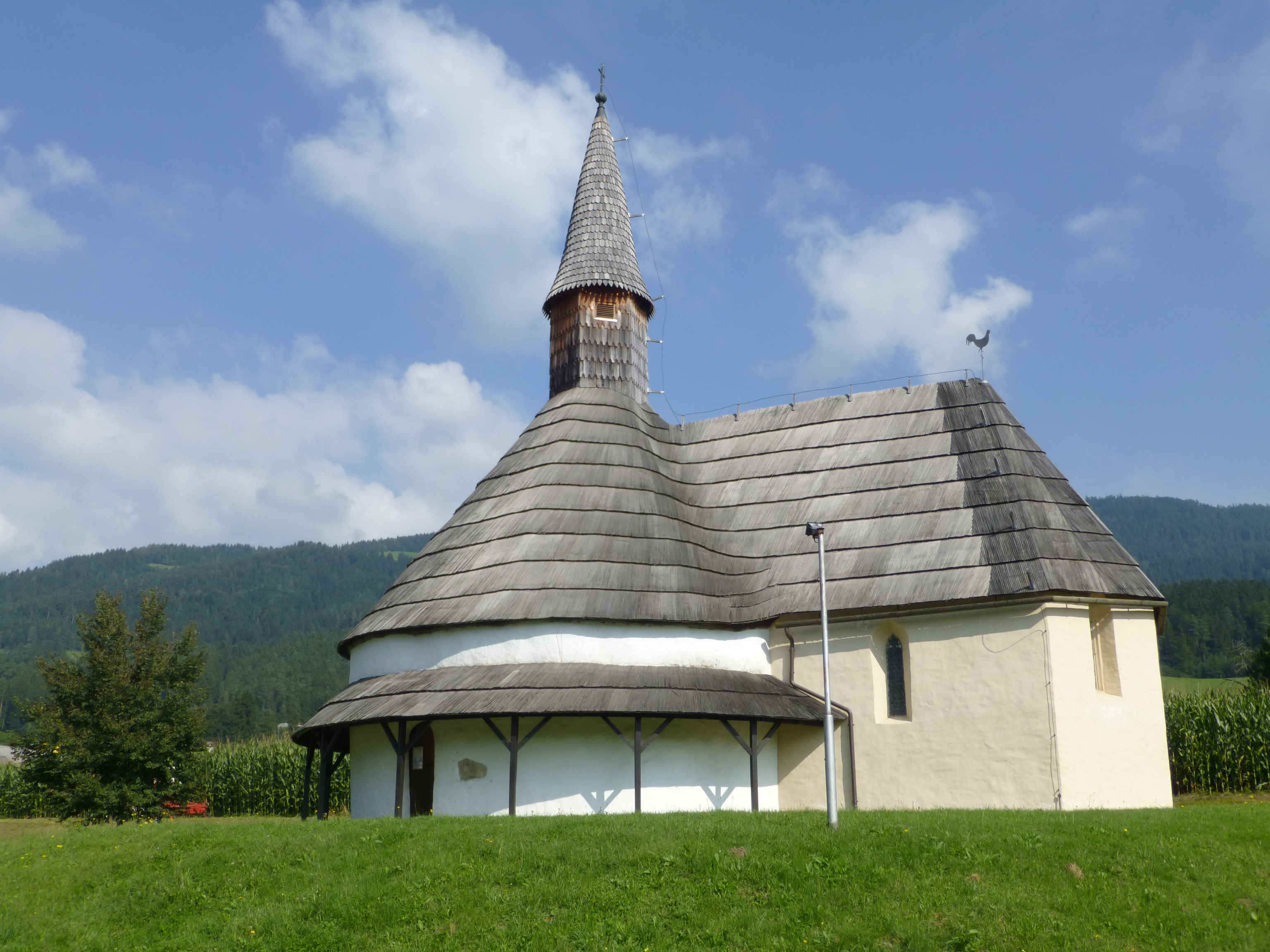 Petite église ronde du XIe s à Muta sur la Drave, dédiée à Saint Jean le Baptiste. Slovénie (ex Styrie).